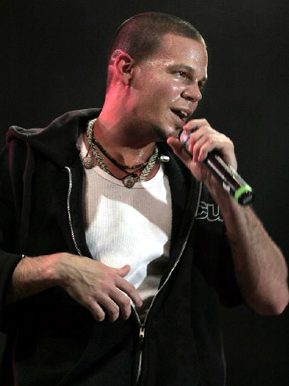 Concierto Calle 13 Managua Nicaragua